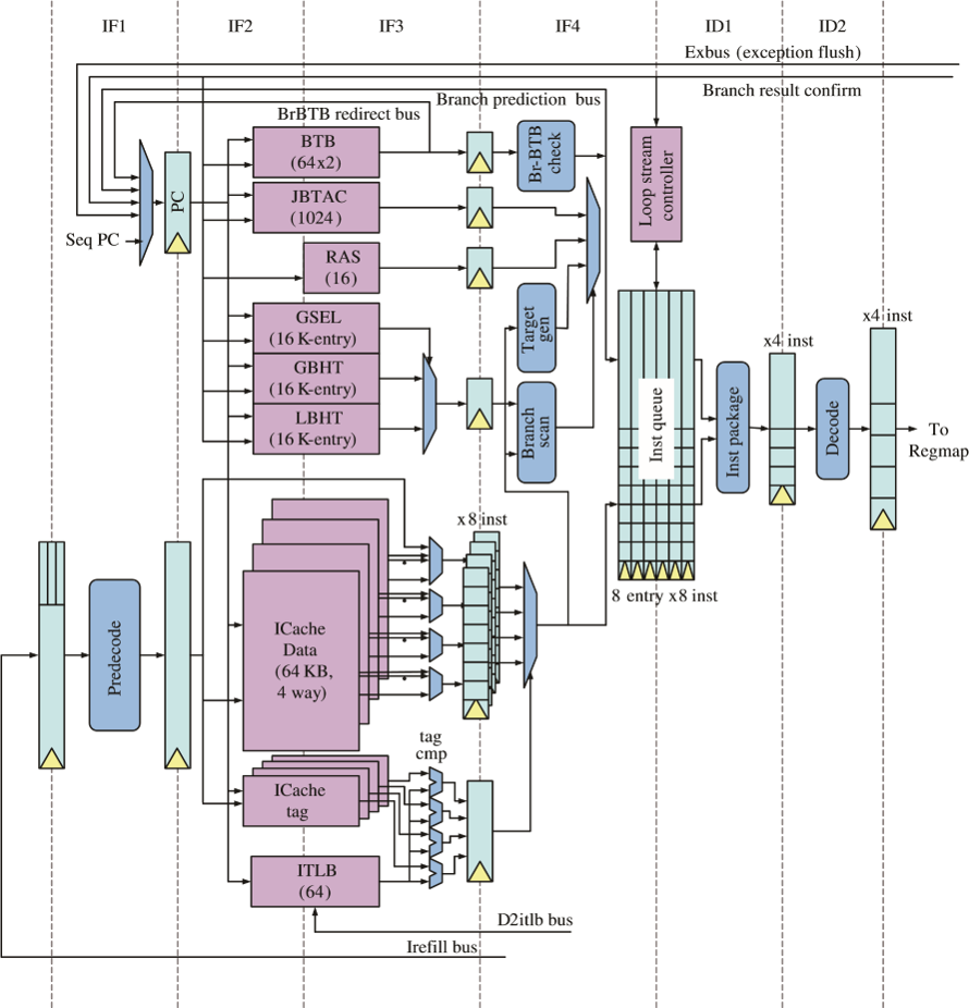 中文（中国大陆）: GS464E取指部件流水线图